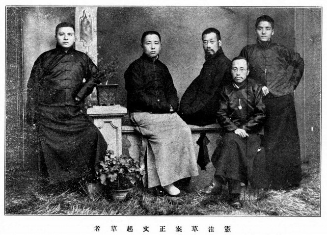 中文（台灣）: 中華民國憲法草案正文起草者